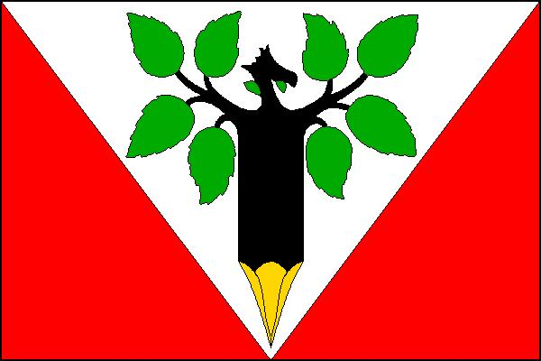 Vlajka obce Miřetice (okres Chrudim)